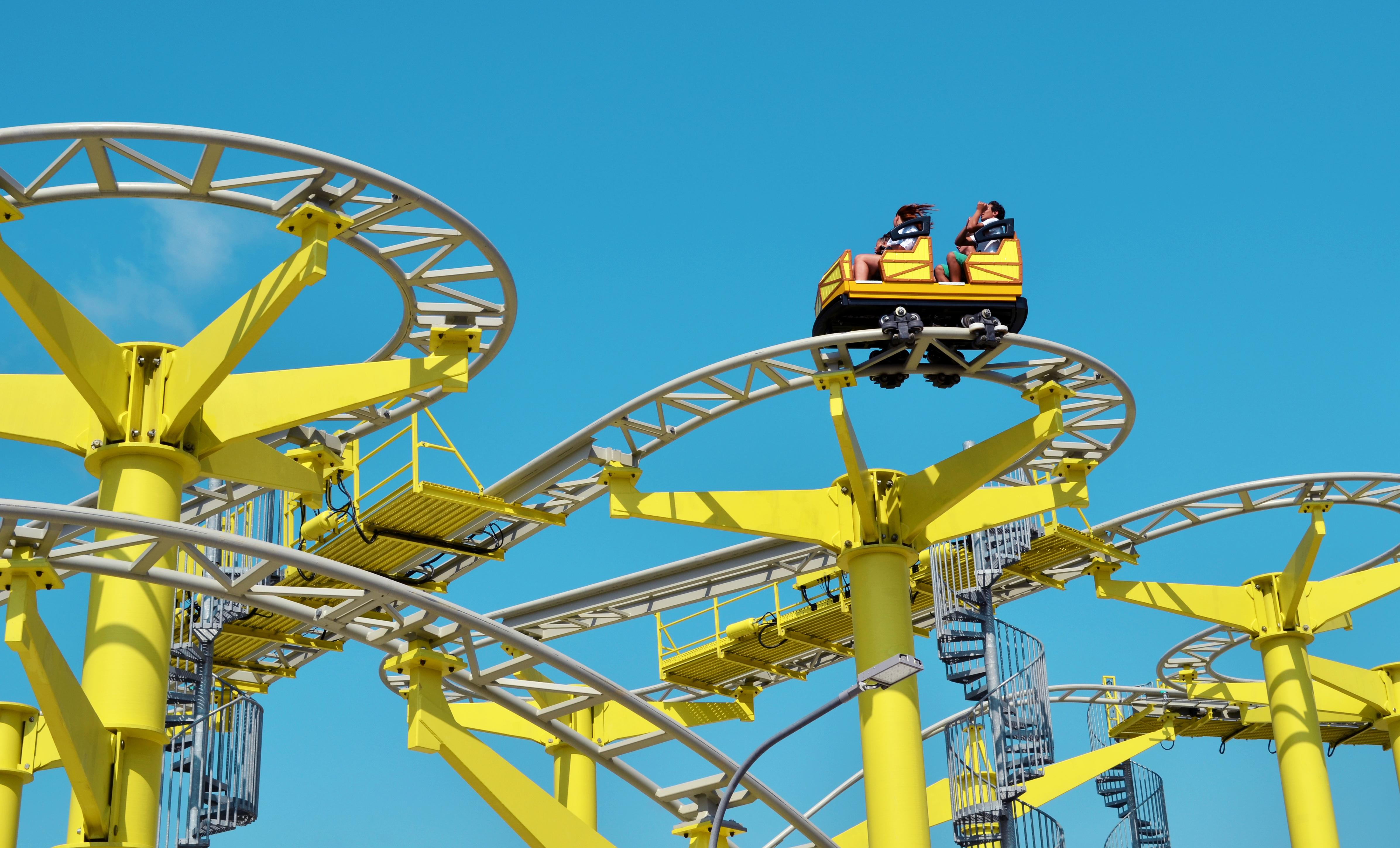 Шаролет. Сочи Парк. Длина трассы 408 м, скорость 65 км/ч.